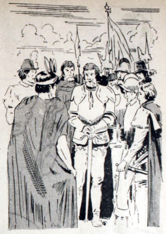 El Gobernador Gabriel Cano y Aponte (1665-1733) durante el Parlamento de Negrete (1726)